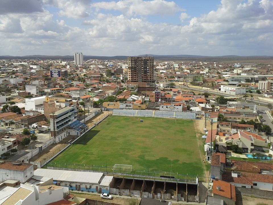 Estádio Otavio limeira Alves